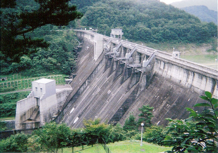 Dam